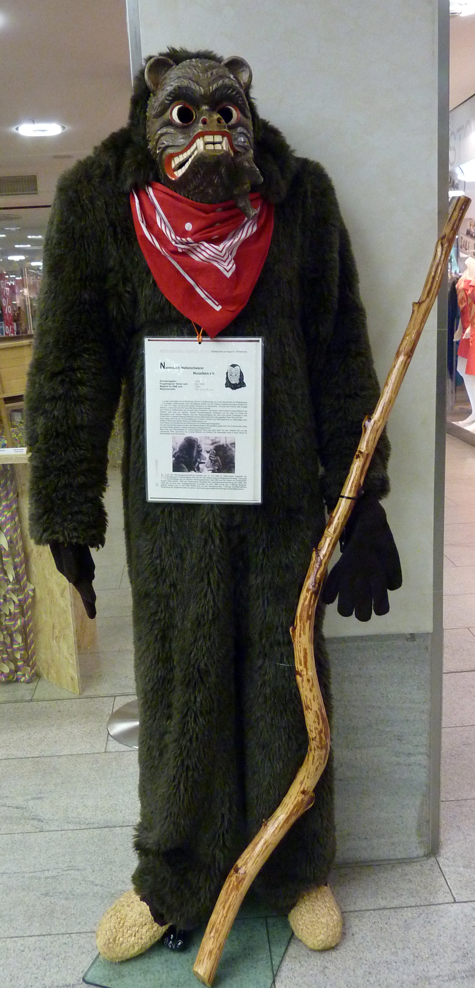 Wurzelbär - Häsfigur der Narrenzunft Walterschwierer Wurzelbäre e.V. Exponat aus der Sammlung Peter Scharte aus der Ortenau, vom 14. Januar bis 13. Februar 2013 im Einkaufszentrum Schwarzwald City (Freiburg) unter dem Titel „Narrenrequisiten - vielfältig und kreativ“ ausgestellt.